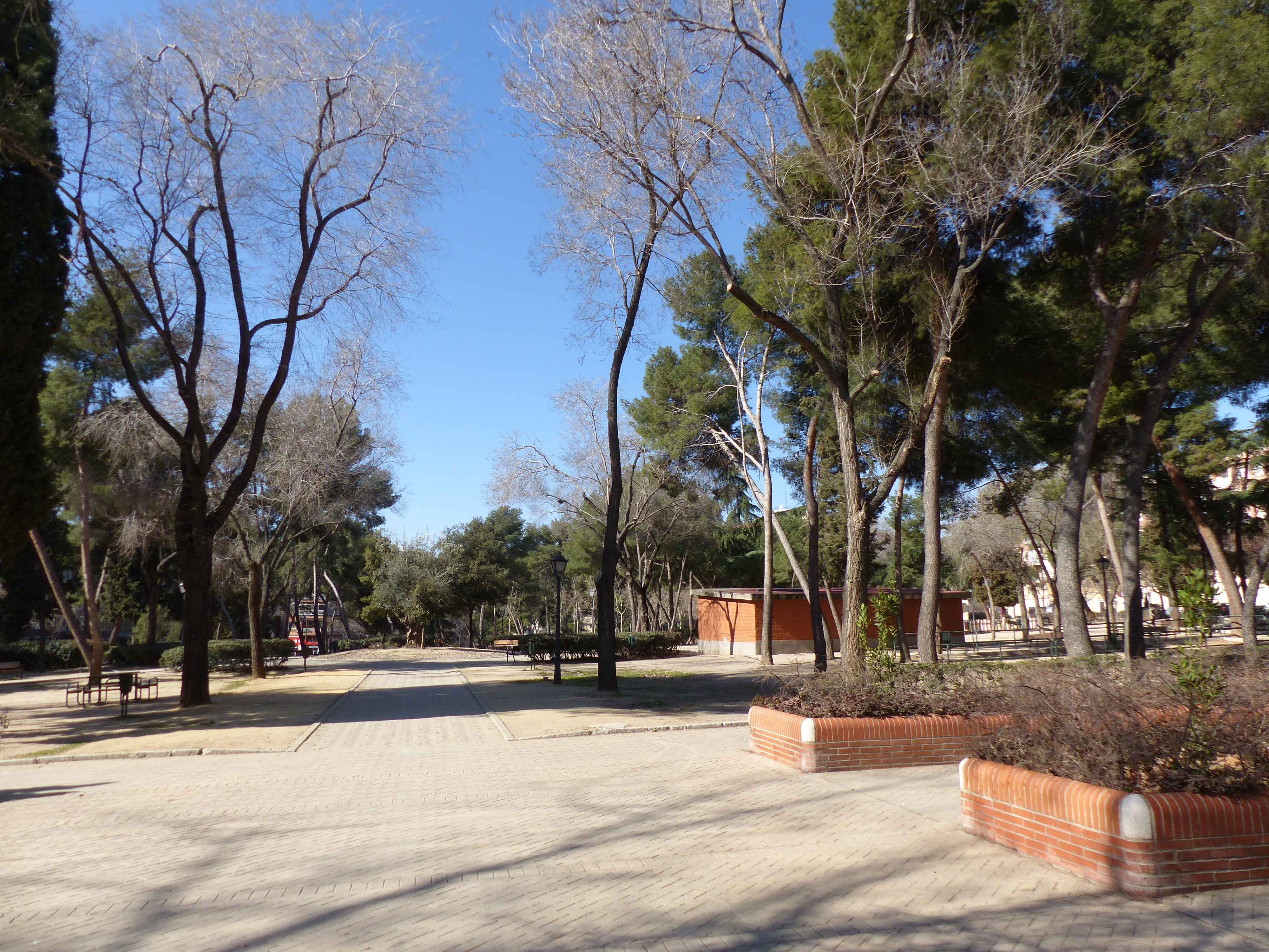 Parque El Calero, Concepción